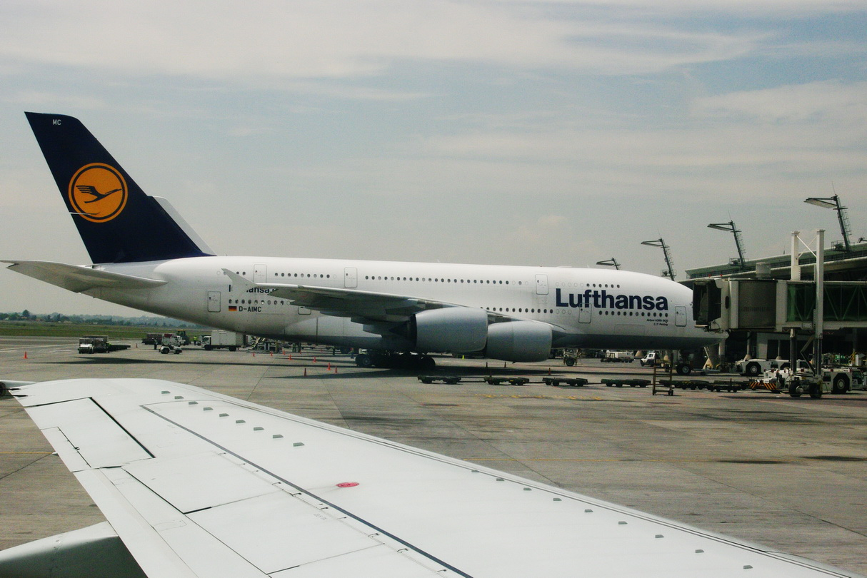 LH A380 auf Rollfeld OR Tambo Airport